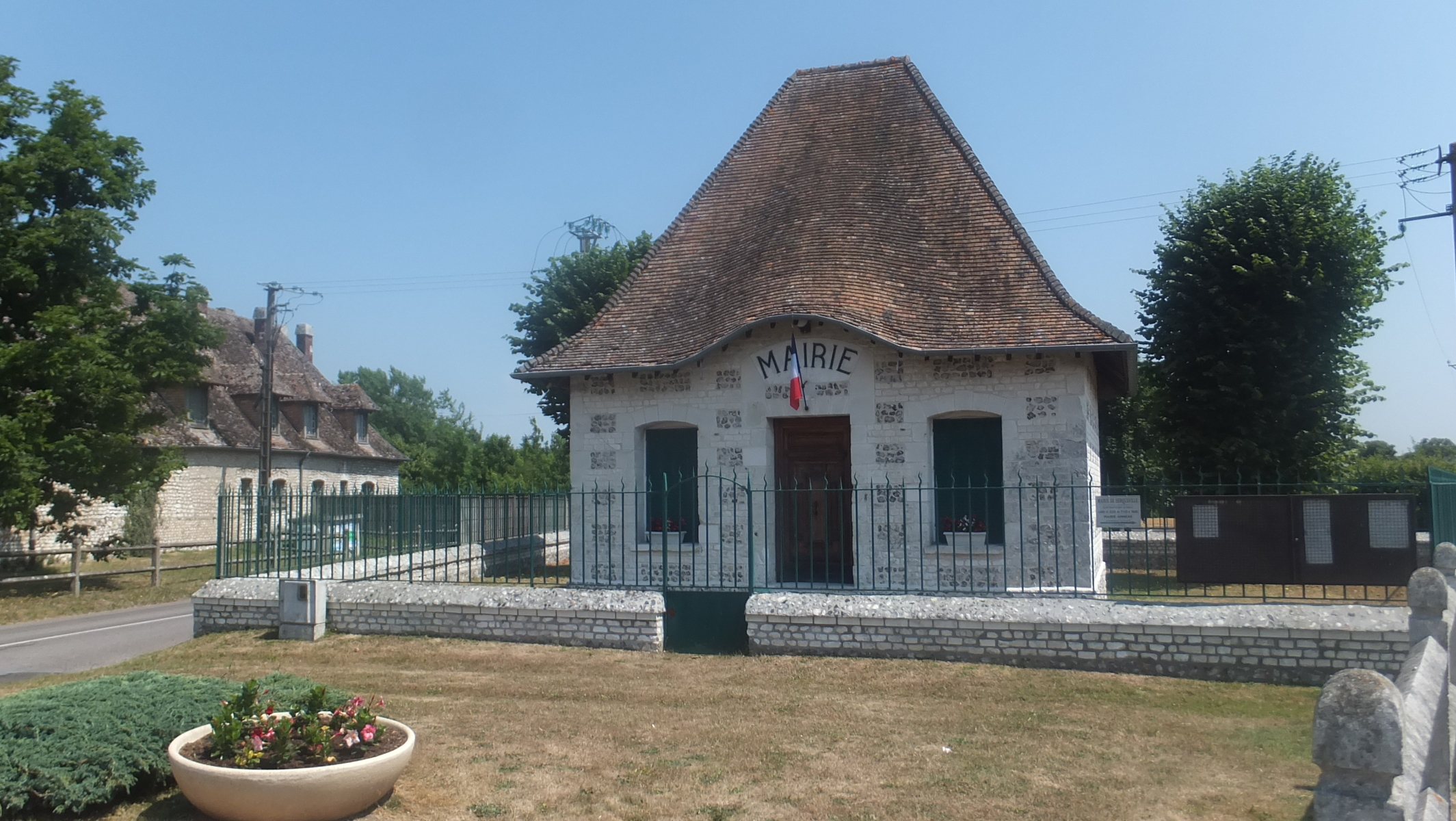 Herqueville (Eure) - Mairie